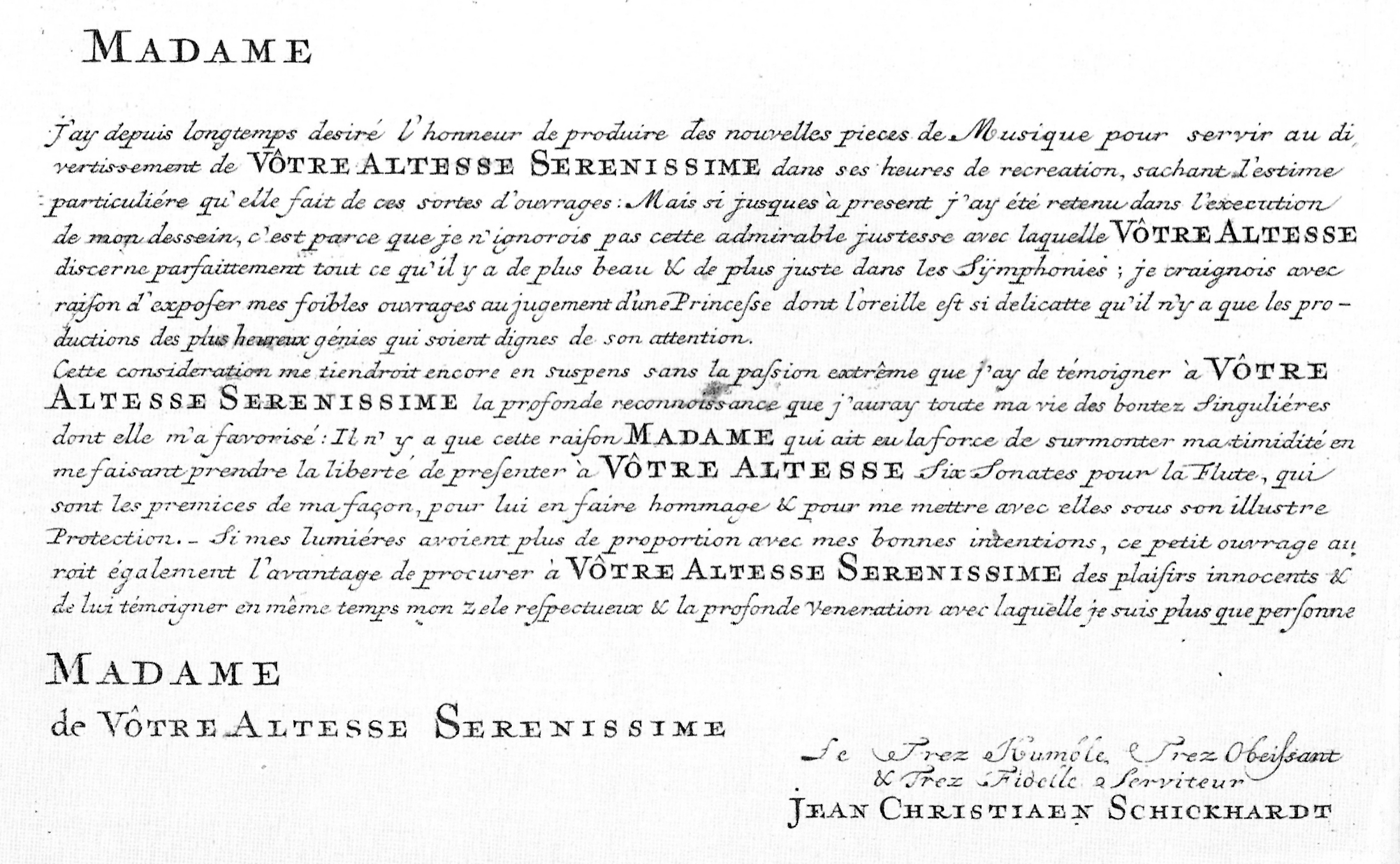 Widmung „Vôtre Altesse Serenissime“ an Prinzessin Henriette Amalie von Nassau-Diez in Sonate für Flöte und Basso continuo op. 1 von Johann Christian Schickhardt